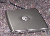 D/Bay pour Latitude D420, D430, XT, D820, D830